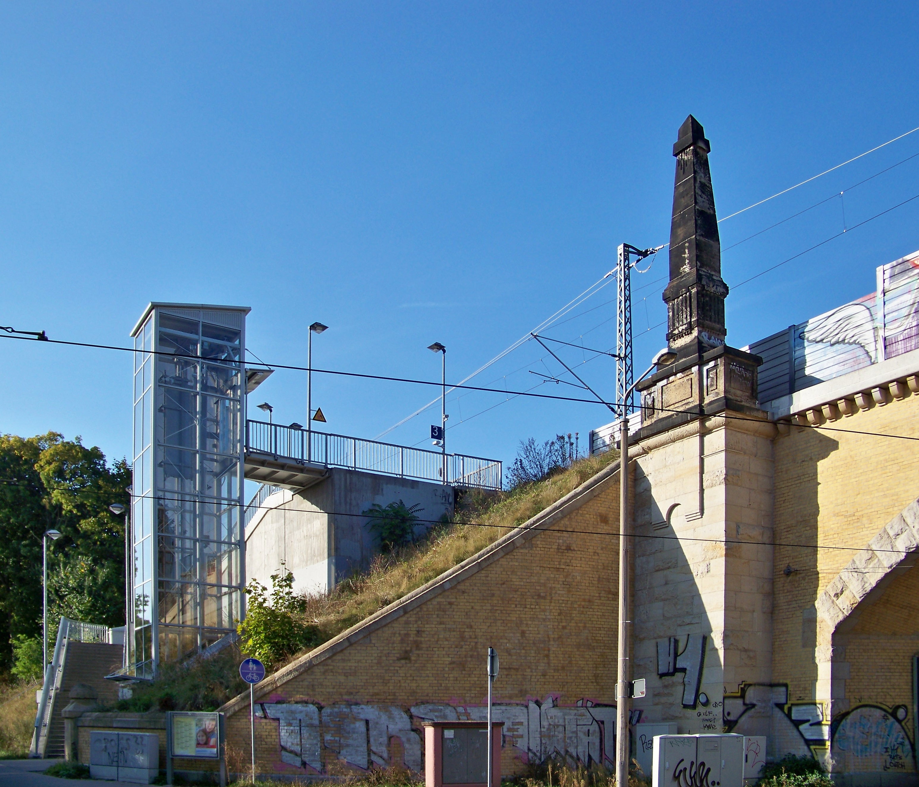 Hochbahnsteig des Bahnhof Leipzig Gohlis aus der Lützowstraße gesehen